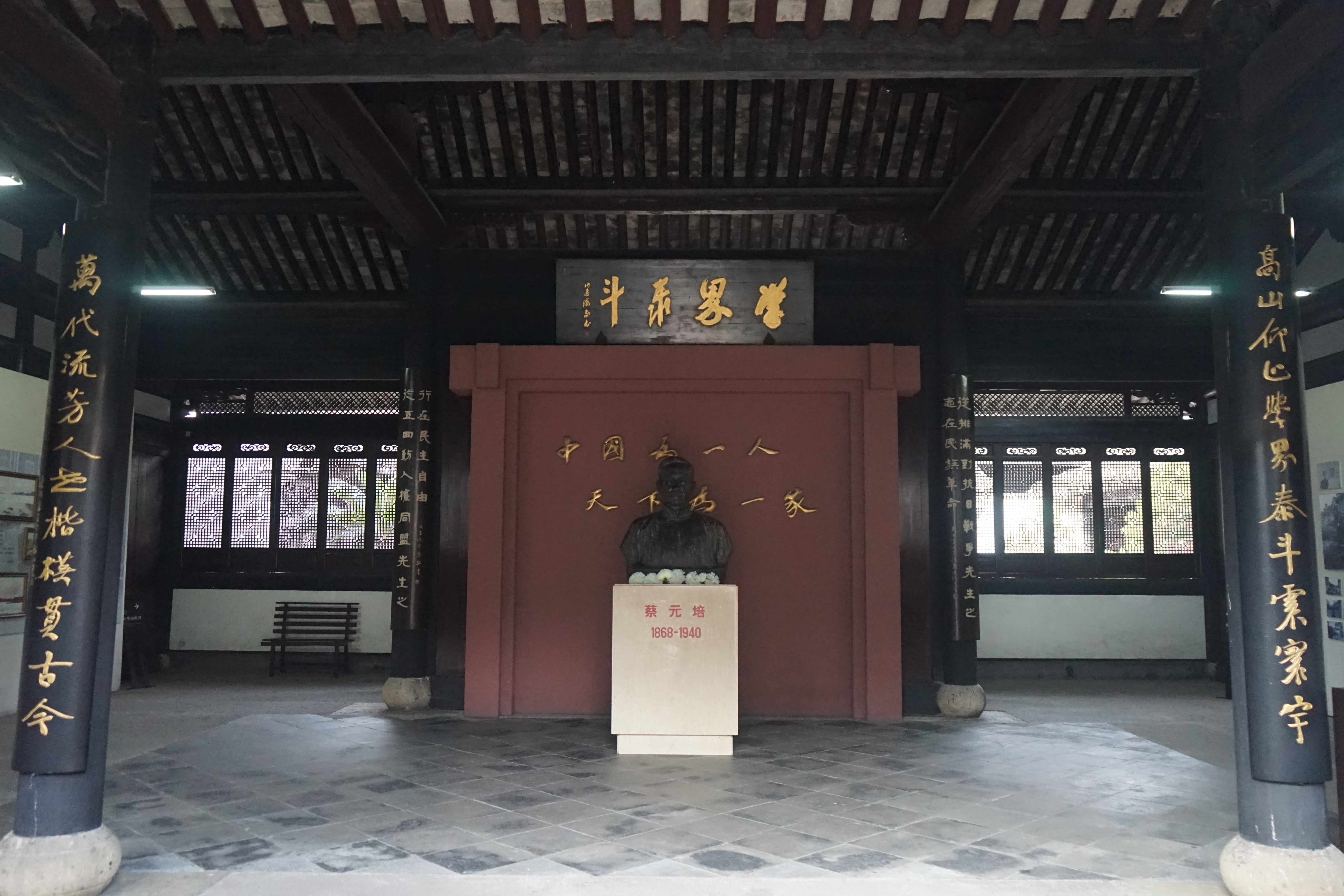 绍兴蔡元培故居序厅 蔡元培像